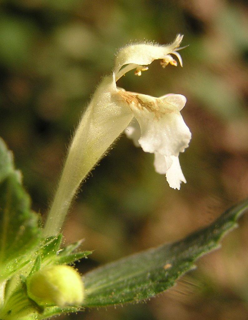 Galeopsis segetum an einer sonnigen Waldstelle im Ahrtal.